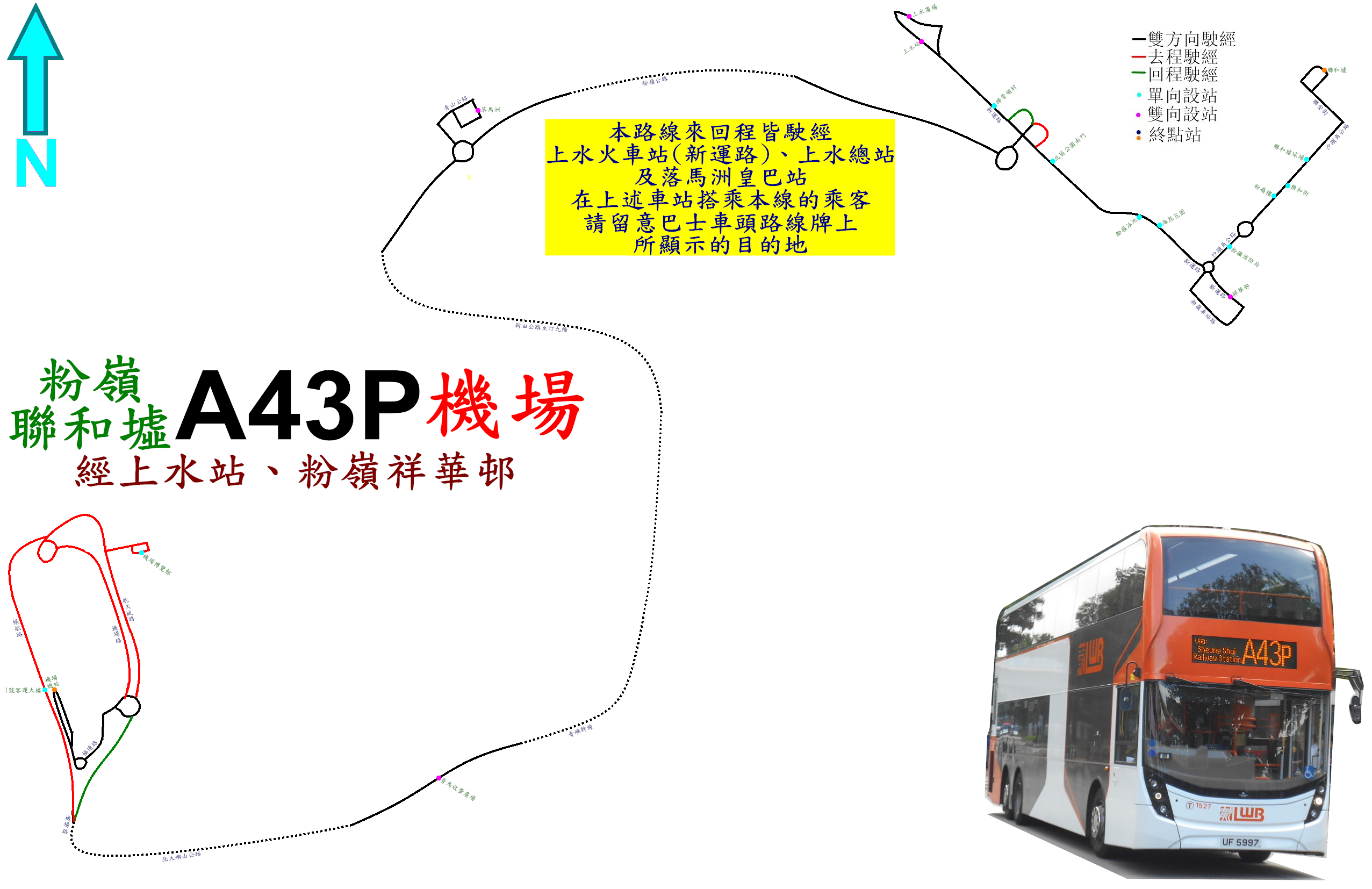 中文（香港）: 龍運巴士A43P線的走線圖